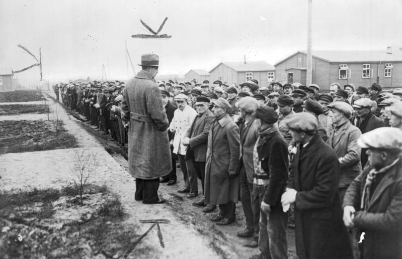 ADN-ZB/Archiv 1933 wurden nach der Machtergreifung durch die faschistischen Nationalsozialisten in Deutschland die Konzentrationslager für politische Gegner errichte. UBz: das Konzentrationslager Esterwegen im Emsland bei Papenburg im Jahre 1933. "Der Inspekteur der Geheimen Staatspolizei Ministerialrat Dr. Diels bei seiner Ansprache an die auf Grund einer Amnestie anläßlich der Novemberwahl zu Weihnachten 1933 zur Entlassung kommenden Häftlinge". 46061-33